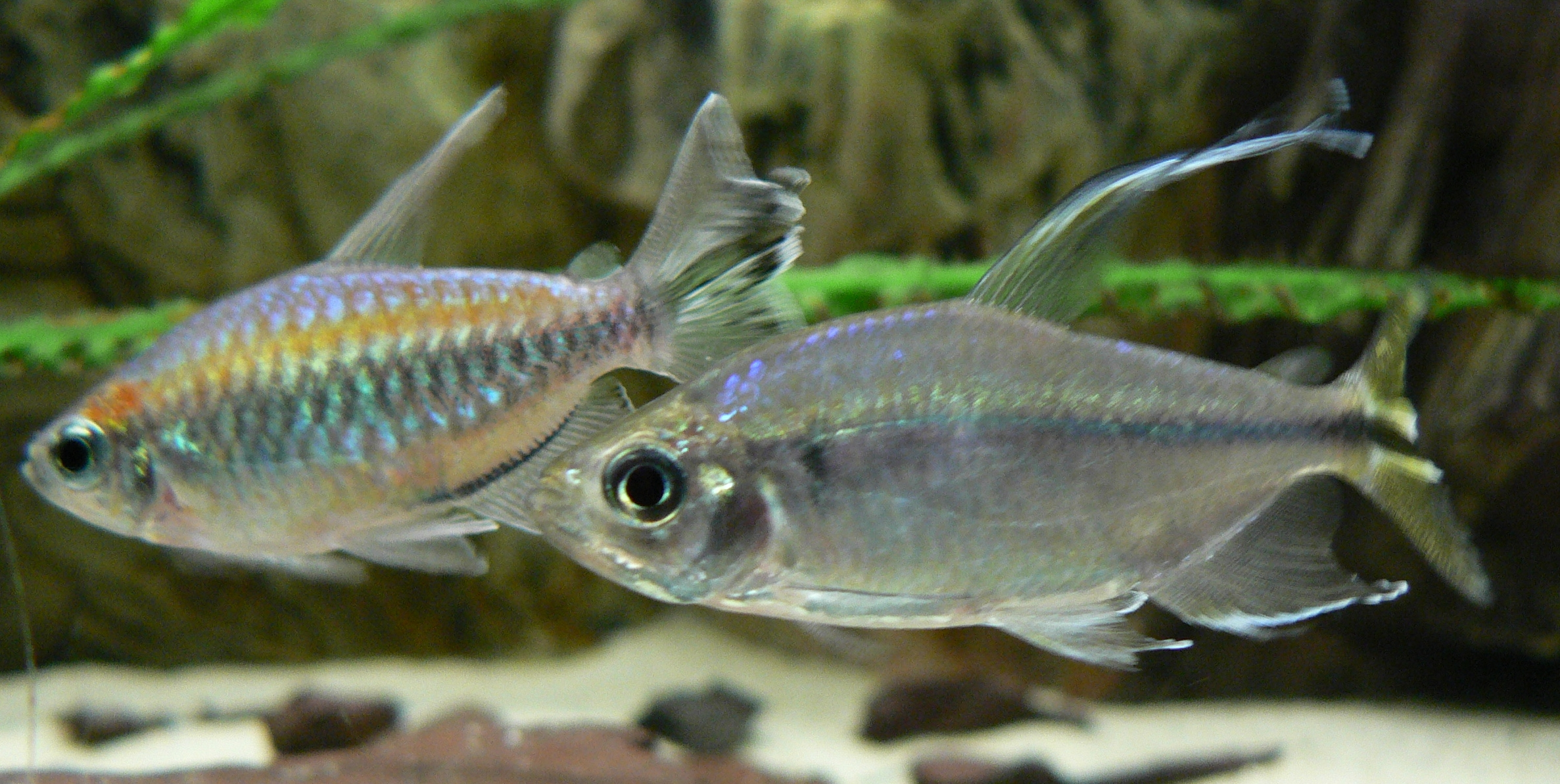 Blauer- und Gelber kongosalmler